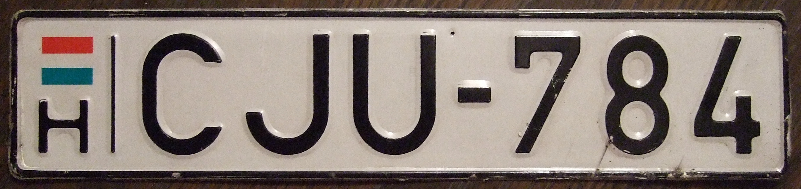 HUNGARY c.2000 passenger plate